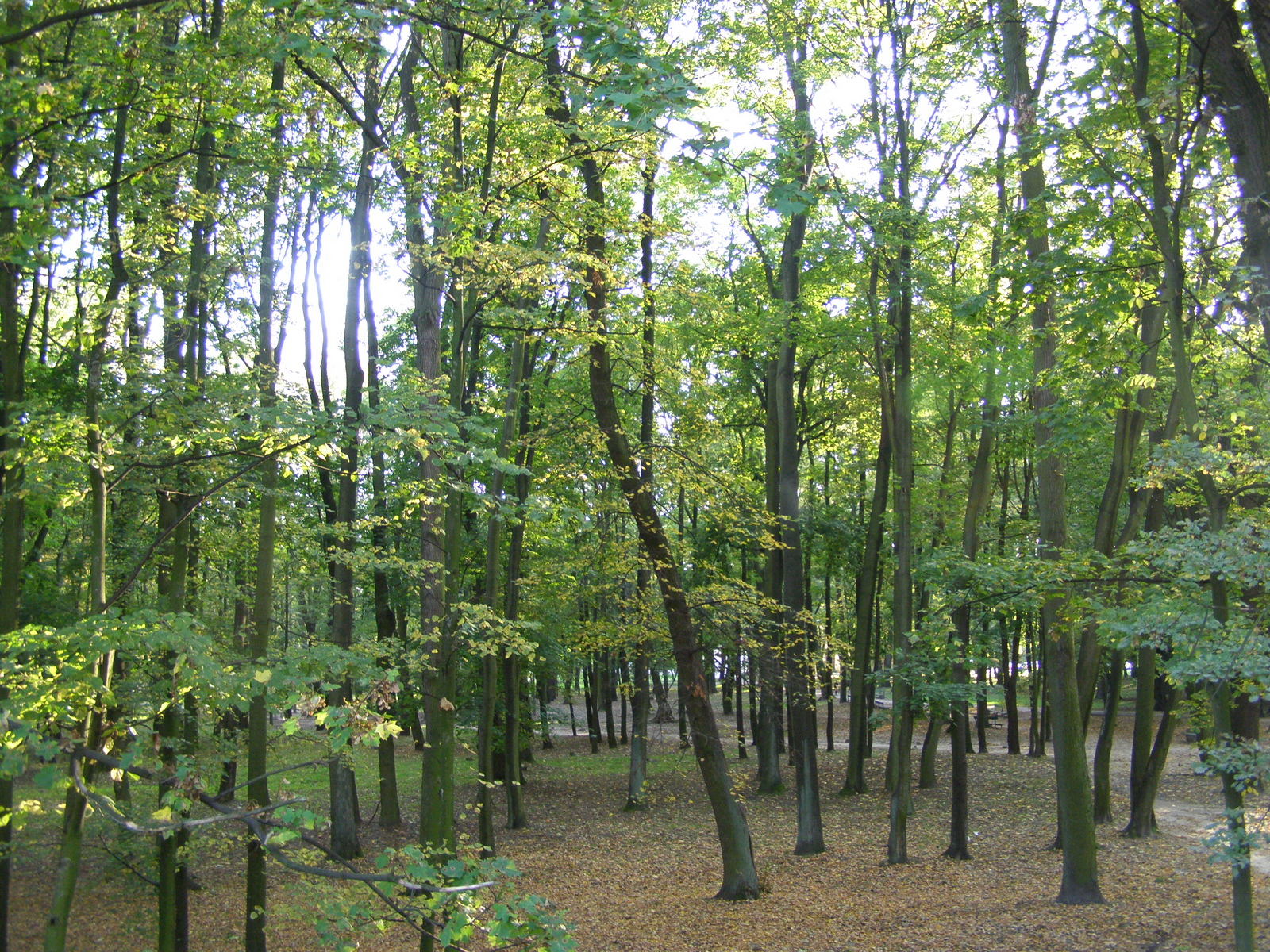 Dernałowicz Family Park in Mińsk Mazowiecki / Park im. Dernałowiczów w Mińsku Mazowieckim